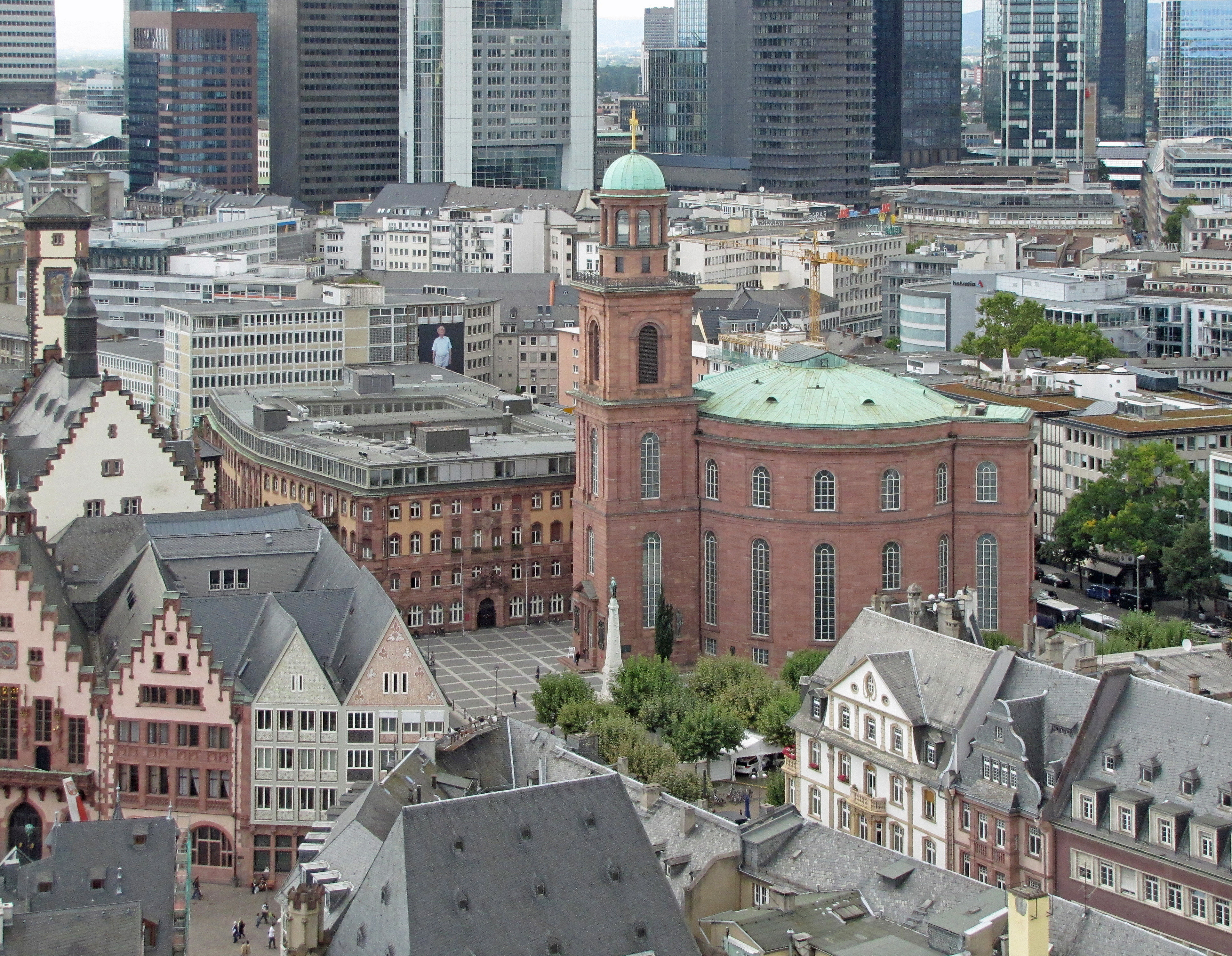 Die Paulskirche in Ffm.